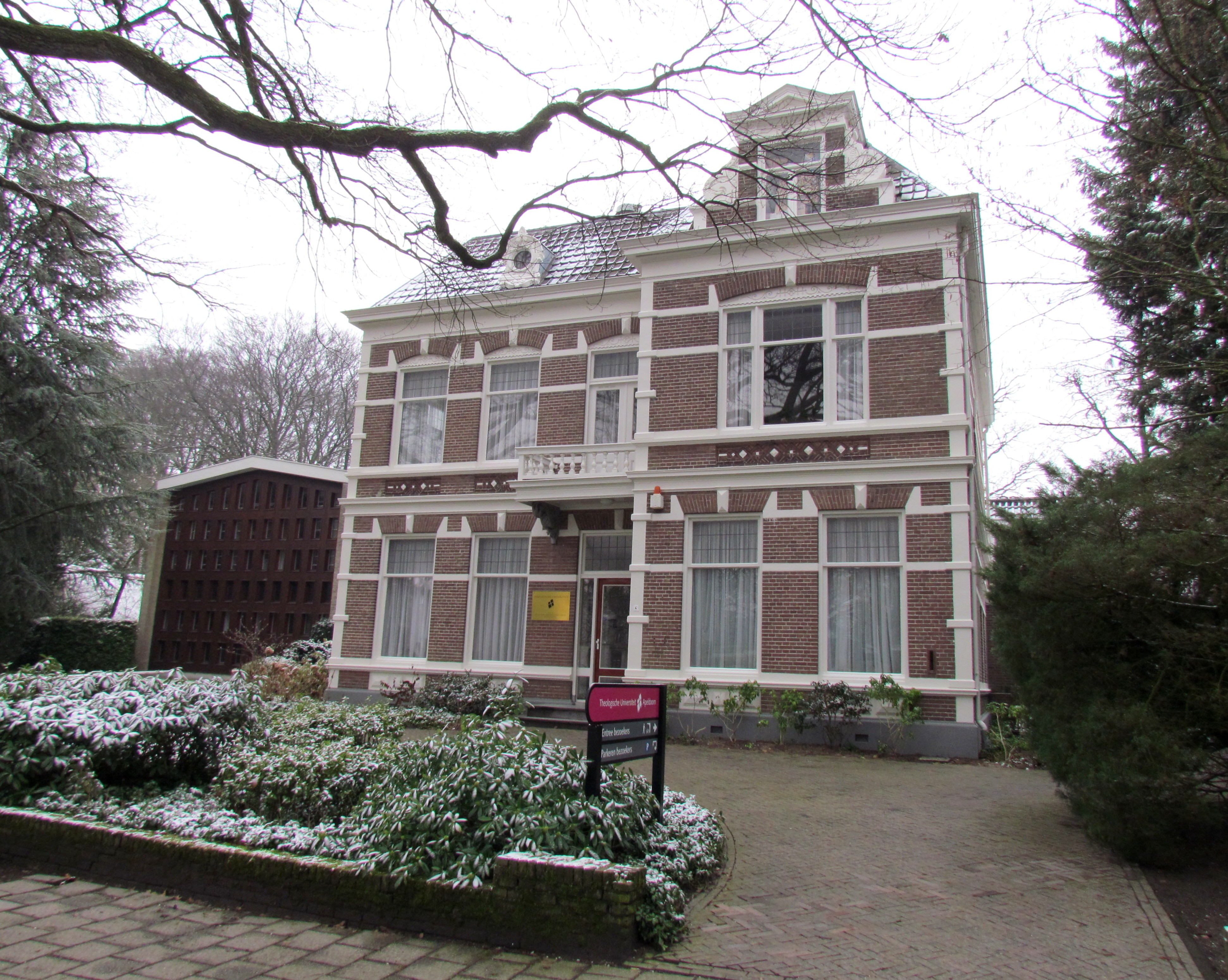 Theologische Universiteit Apeldoorn, Wilhelminapark. Opleidingsinstituut van de Christelijke Gereformeerde Kerken